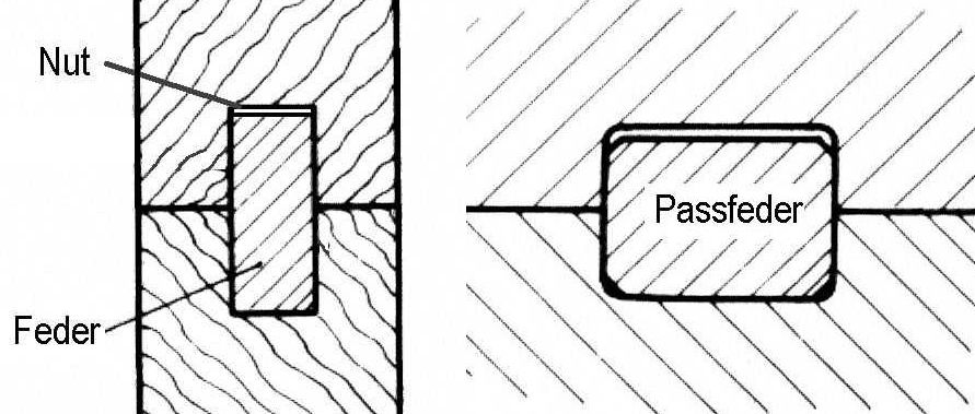 Nut-Feder-Verbindung (Holzgewerbe) und Passfeder (Maschinenelement)